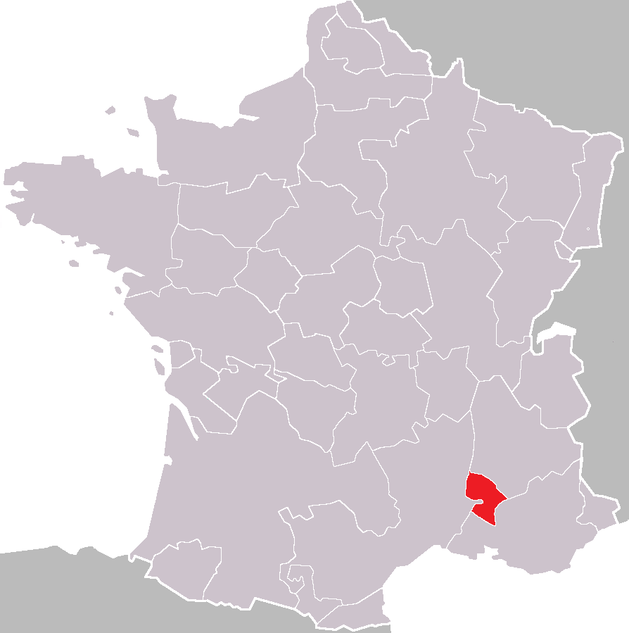 Carte du Comtat Venaissin dans la collection des provinces de France sous l'ancien régime. Carte réalisée à l'aide de